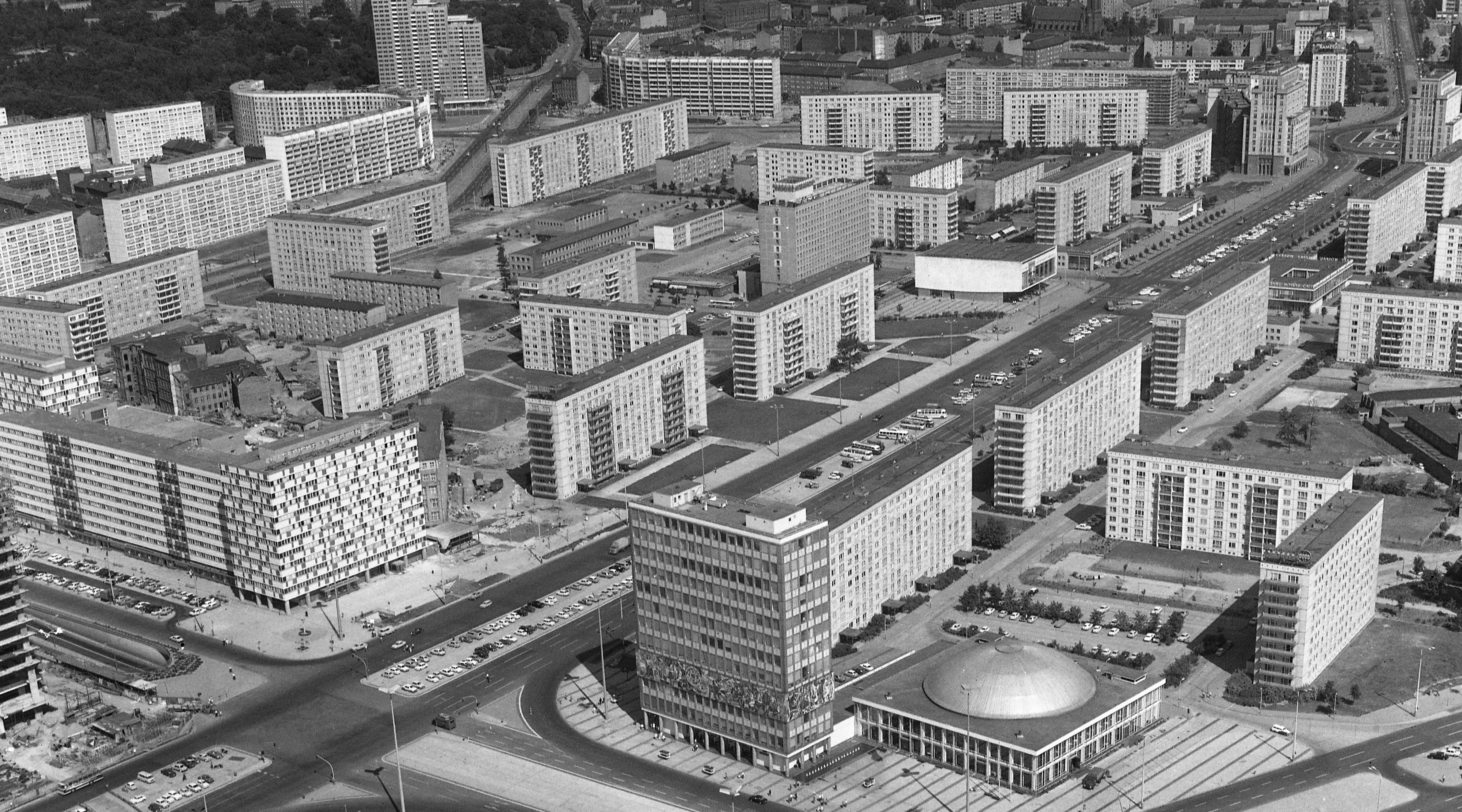 Kelet-Berlin, kilátás a TV toronyból, előtérben az Alexanderplatz, mögötte a Karl Marx Allee. Location: Germany, Berlin Tags: GDR, East-Berlin, modern architecture Title: Kelet-Berlin, kilátás a TV toronyból, előtérben az Alexanderplatz, mögötte a Karl Marx Allee.